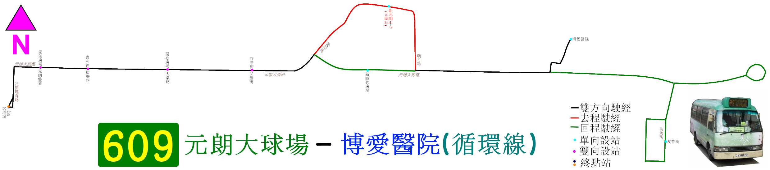 中文（香港）: 新界專線小巴609線的走線圖